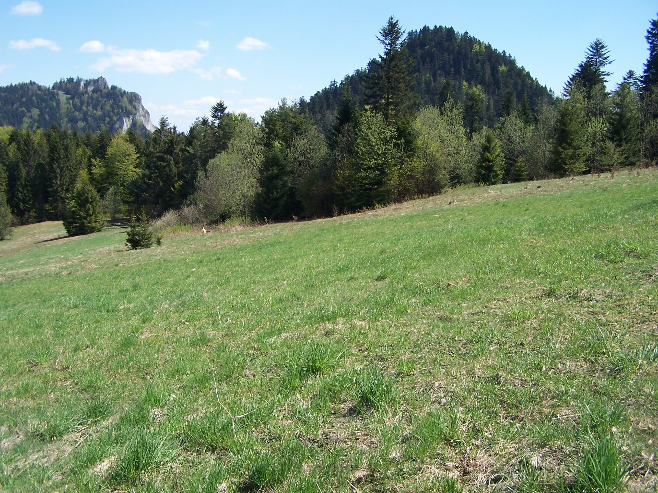 Polana Forendówka w Pieninach Czorsztyńskich i Nowa Góra. W głębi Trzy Korony